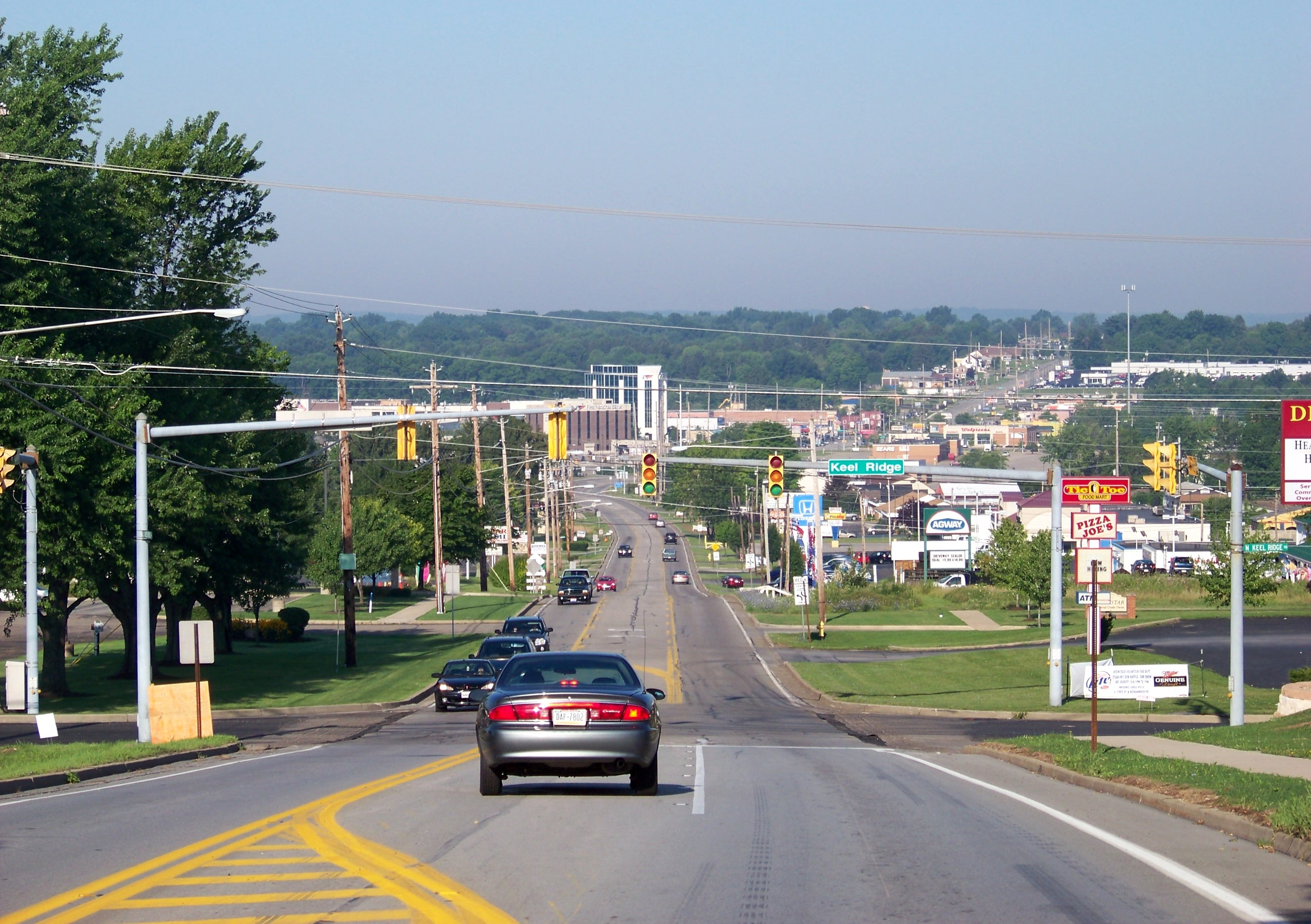 Hermitage, Pennsylvania